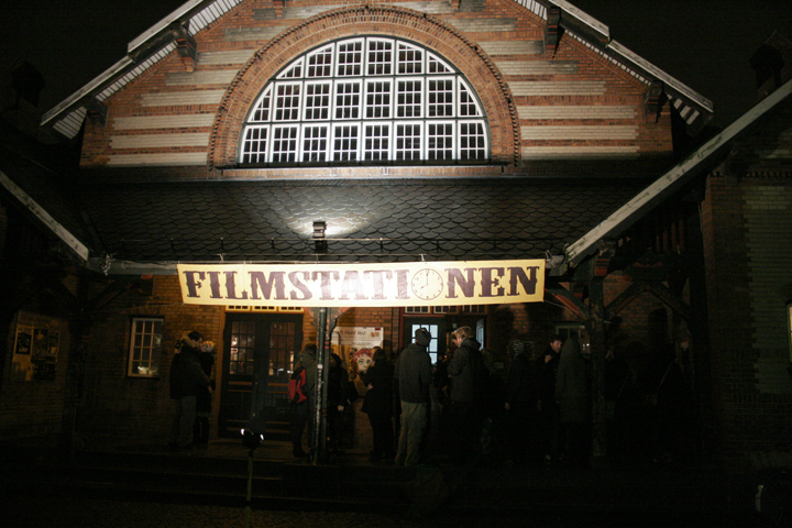 FilmStationen efter en visning i februar 2008. Siden 2007 har FilmStationen med jævne mellemrum forvandlet Lygten Station til en alternativ biograf.